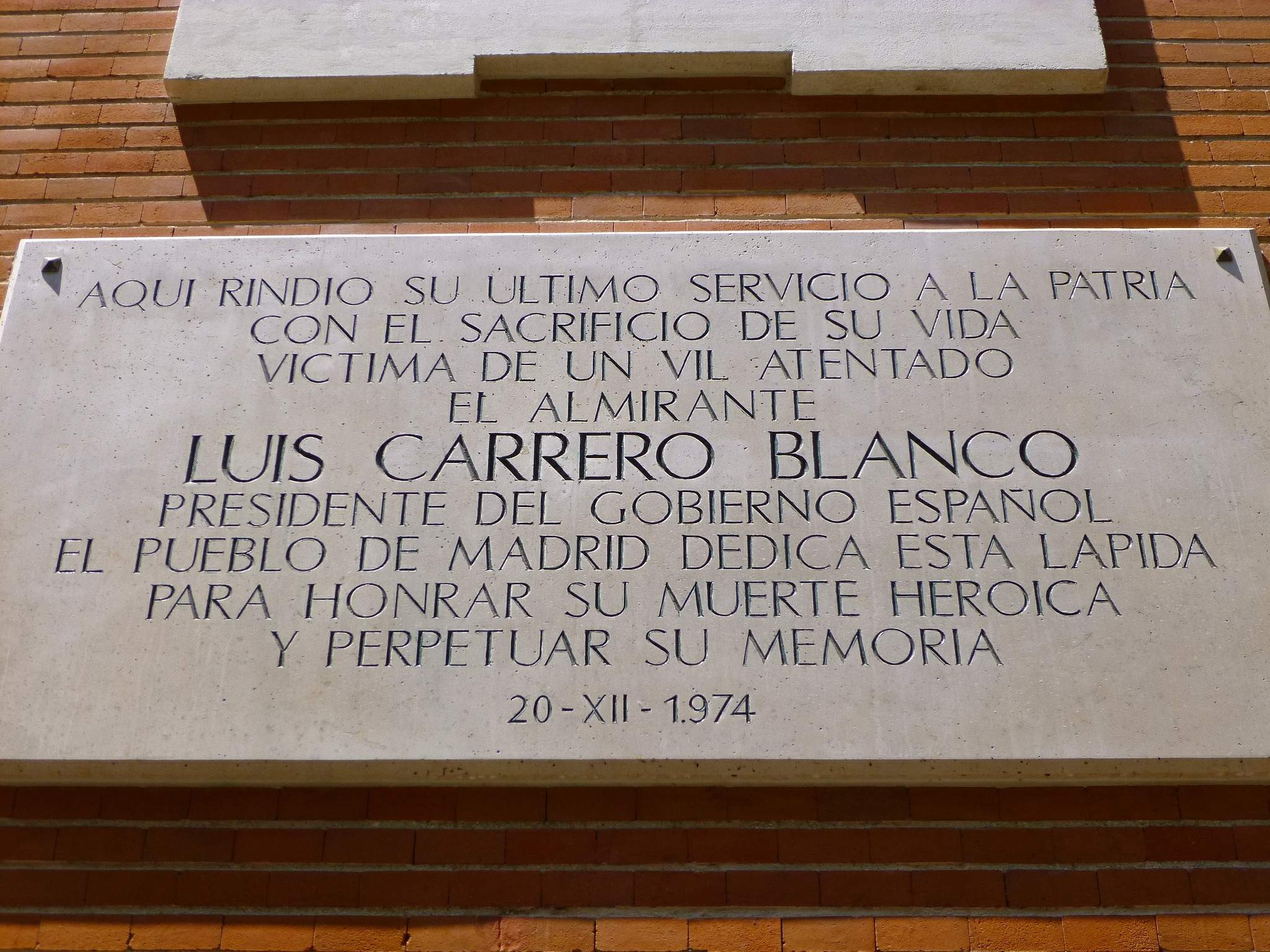 Calle Claudio Coello, memorial de Carrero Blanco en la fachada en la Casa Profesa de la Compañía de Jesús (Madrid)